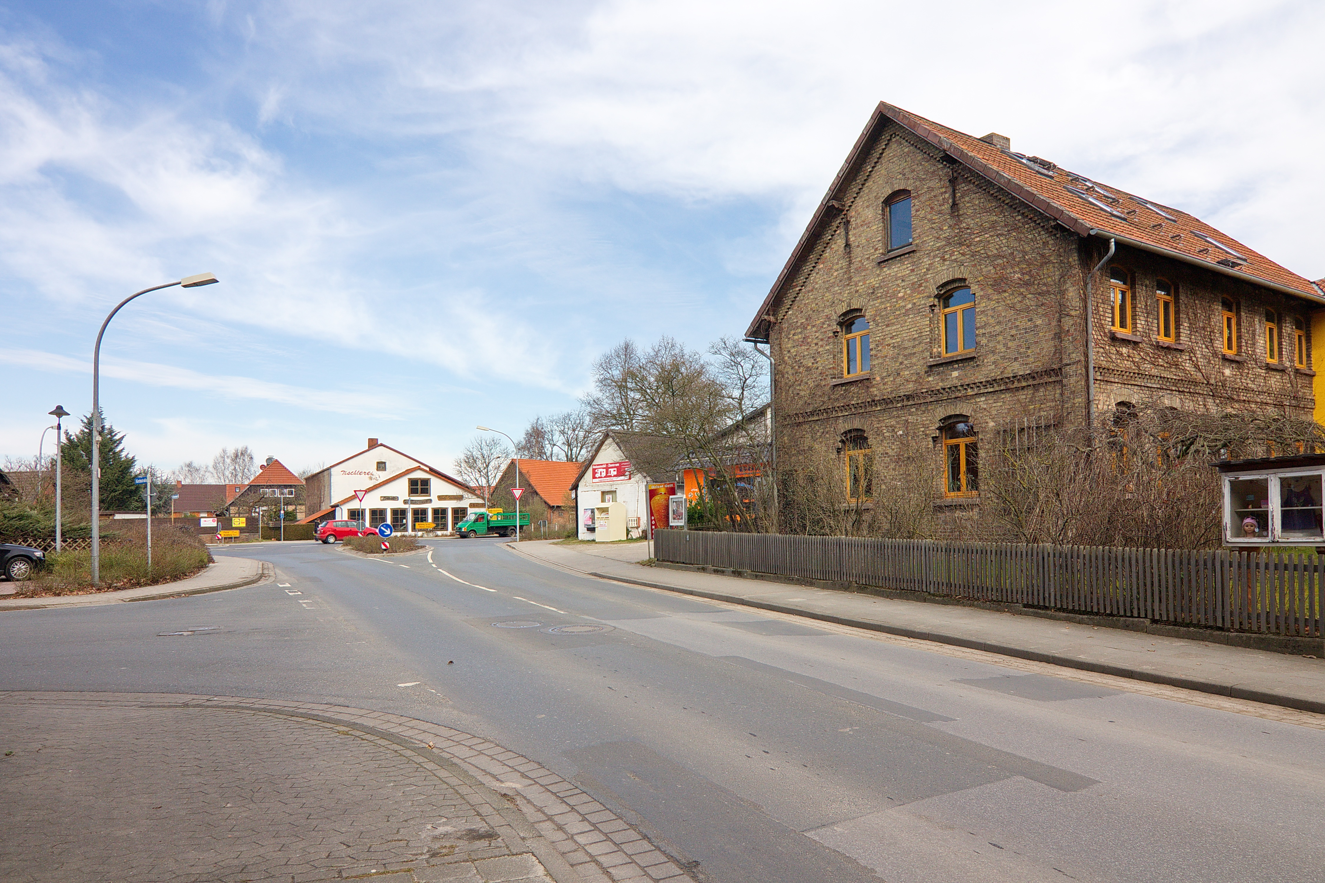 Groß Schwülper (Schwülper), Niedersachsen, Deutschland